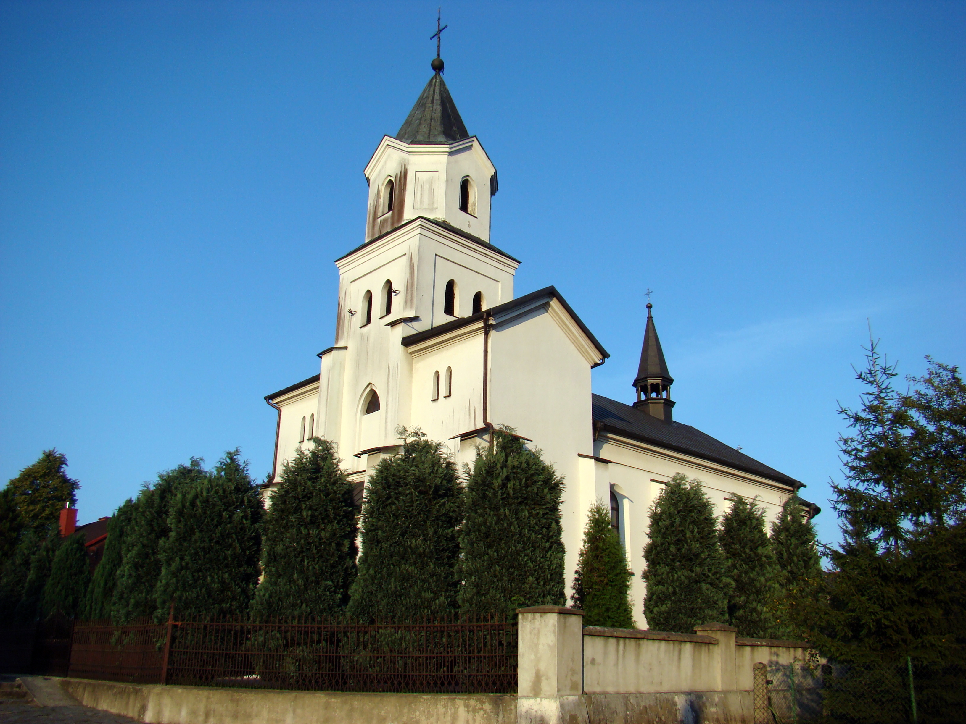 Kościół św. Michała Archanioła w Kamienicy Polskiej, wybudowany w latach 1868-1870.